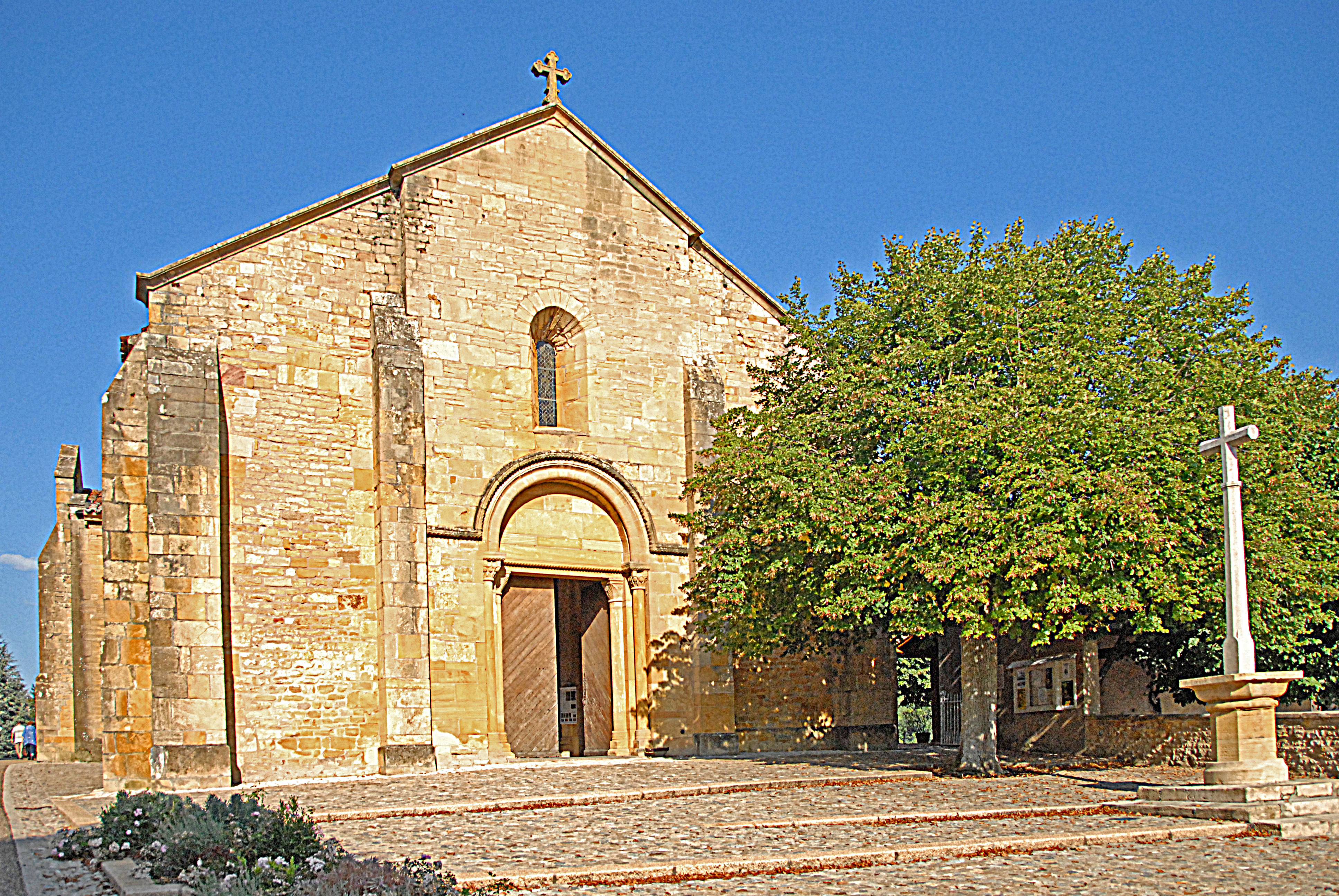 St-André d'Iguerande, Fassade von Südwesten